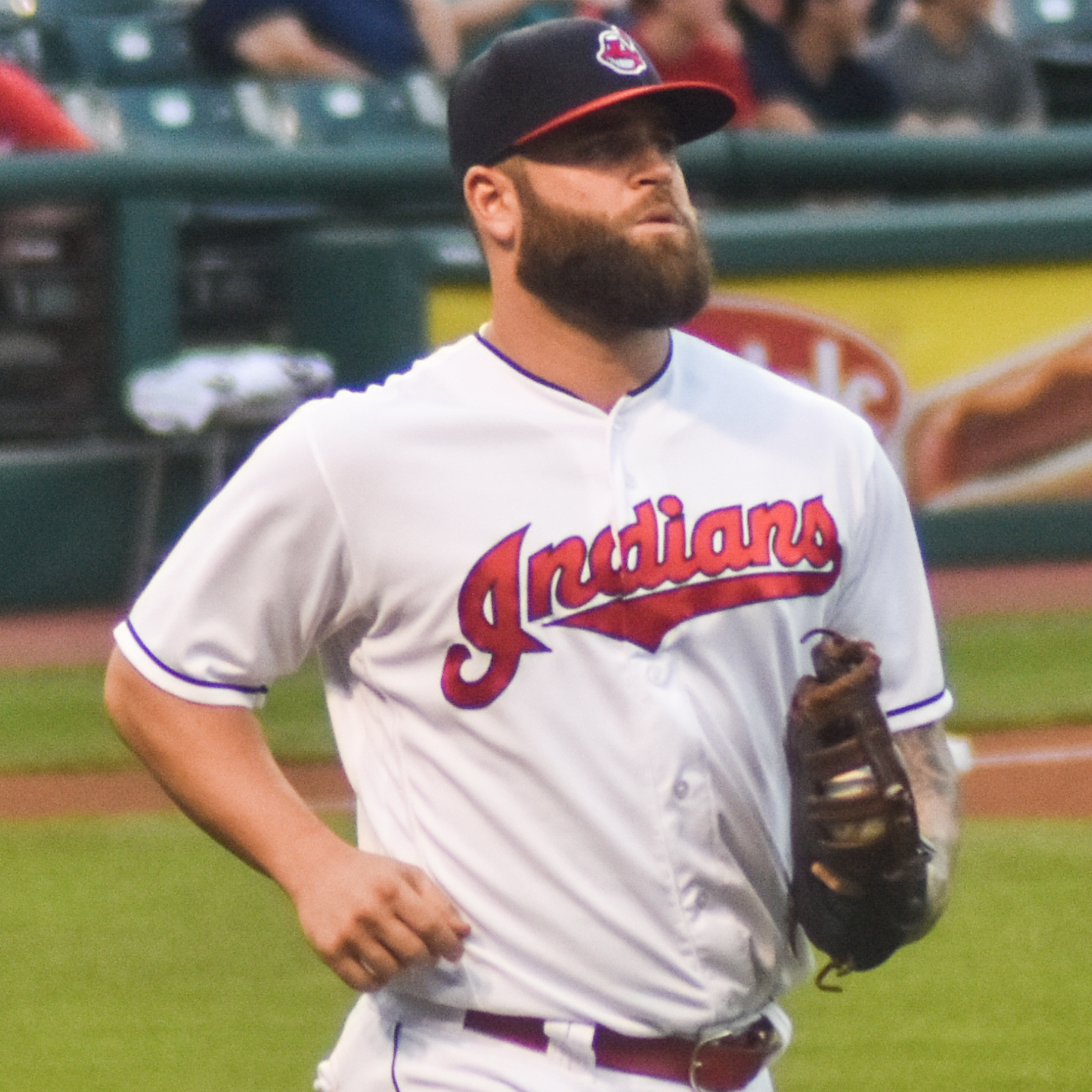 Mike Napoli